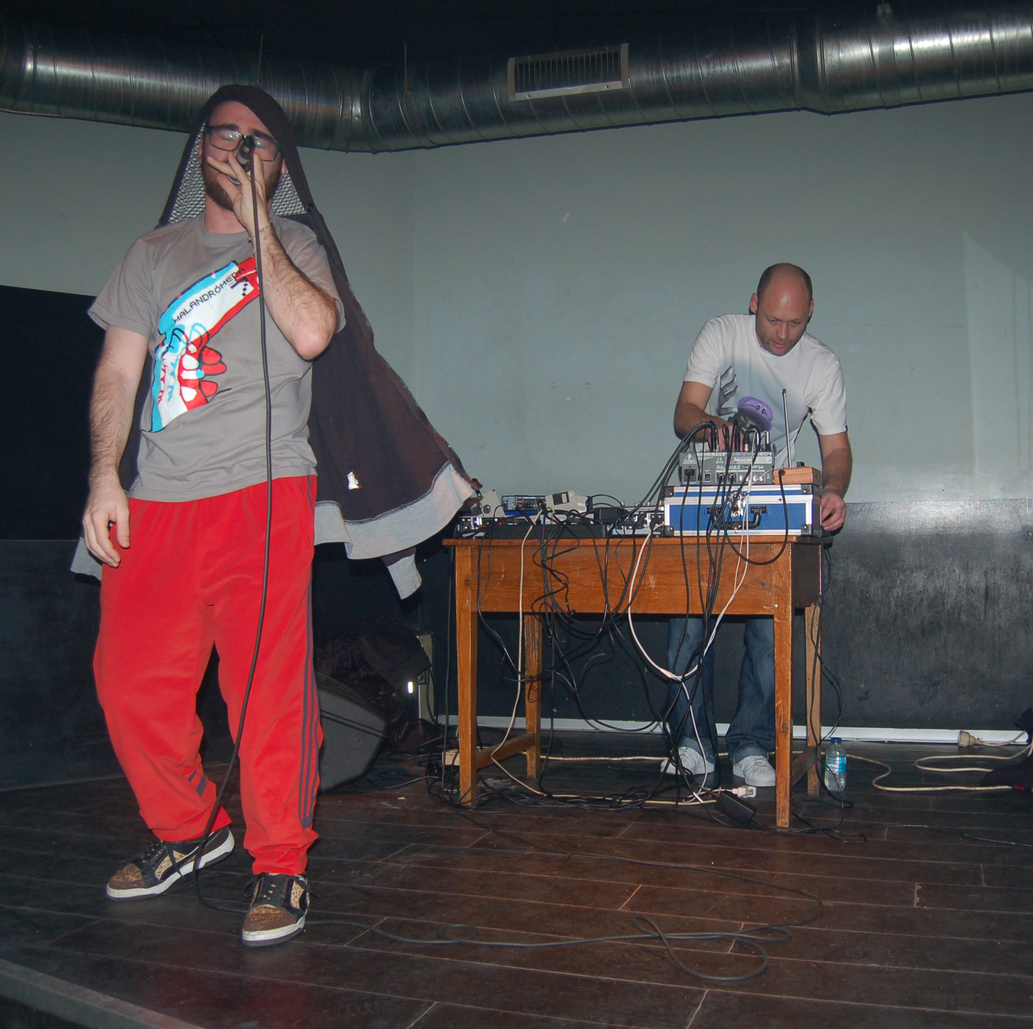 Malandrómeda en concerto na sala Pousada das Ánimas de Boiro